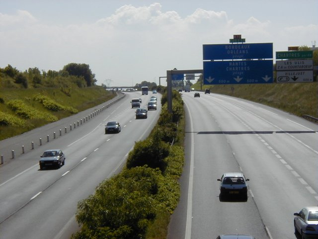 L'autoroute A10 à la hauteur de Villebon-sur-Yvette, dans l'Essonne (France). Sur le panneau, on peut lire les directions de Bordeaux, Orléans, Nantes et Chartres.